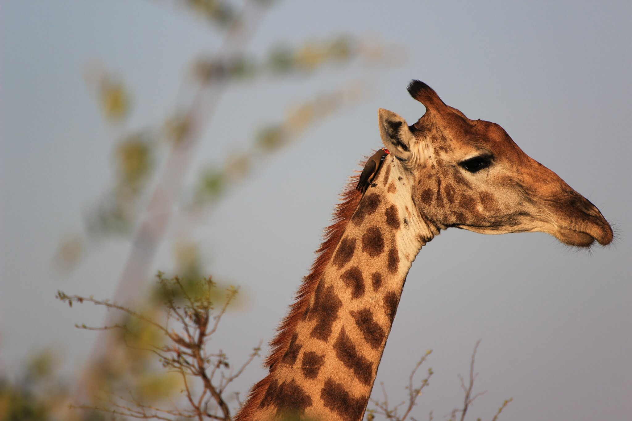 Giraffe mit Madenhacker am Halt